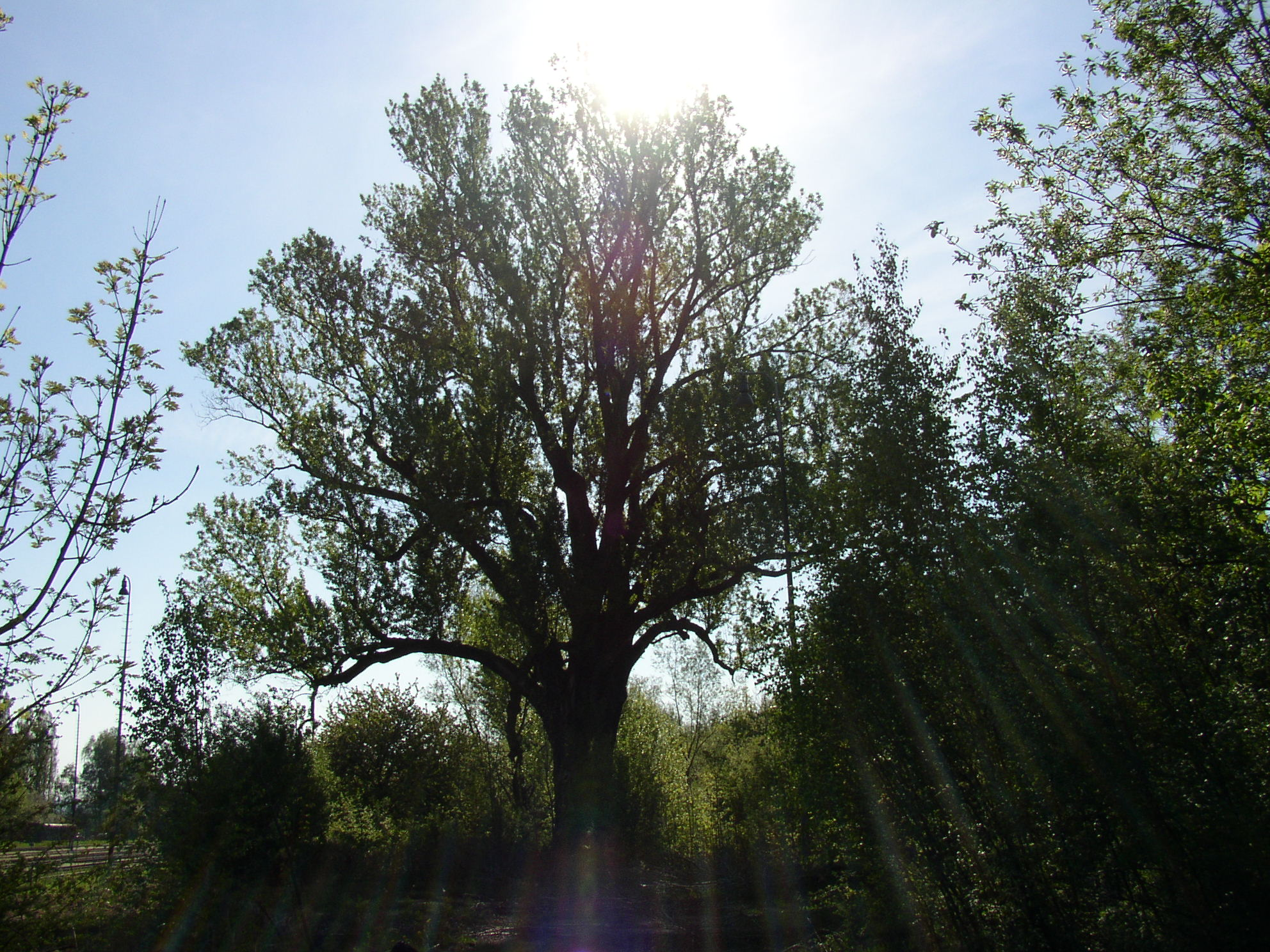 Topol černý, jižně od vlakového nádraží, Varnsdorf, okres Děčín, Ústecký kraj, Česká republika